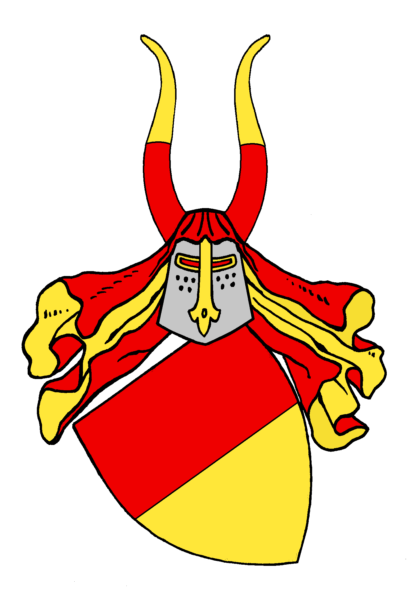 Stammwappen der altgräflichen Grafen von Schwerin, deren Territorium später an die Mecklenburger Fürsten kam.